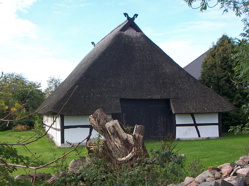 historische Scheune in Rethwisch